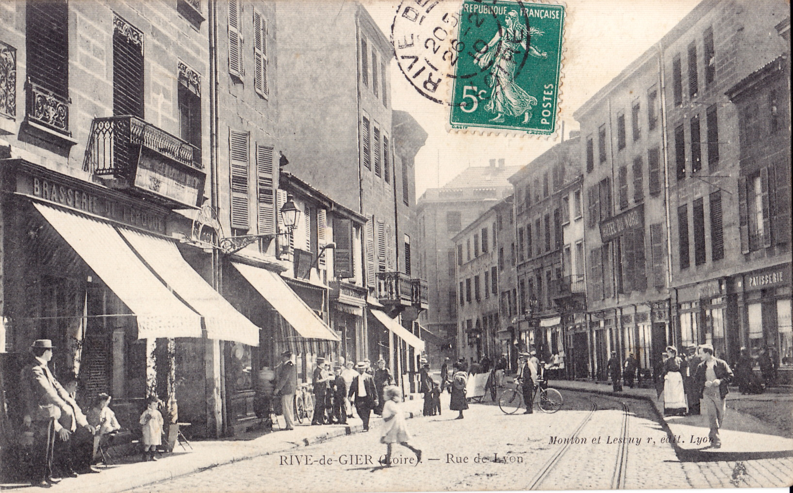 Carte postale ancienne éditée par Monton et Lescuy à Lyon : RIVE-DE-GIER - Rue de Lyon